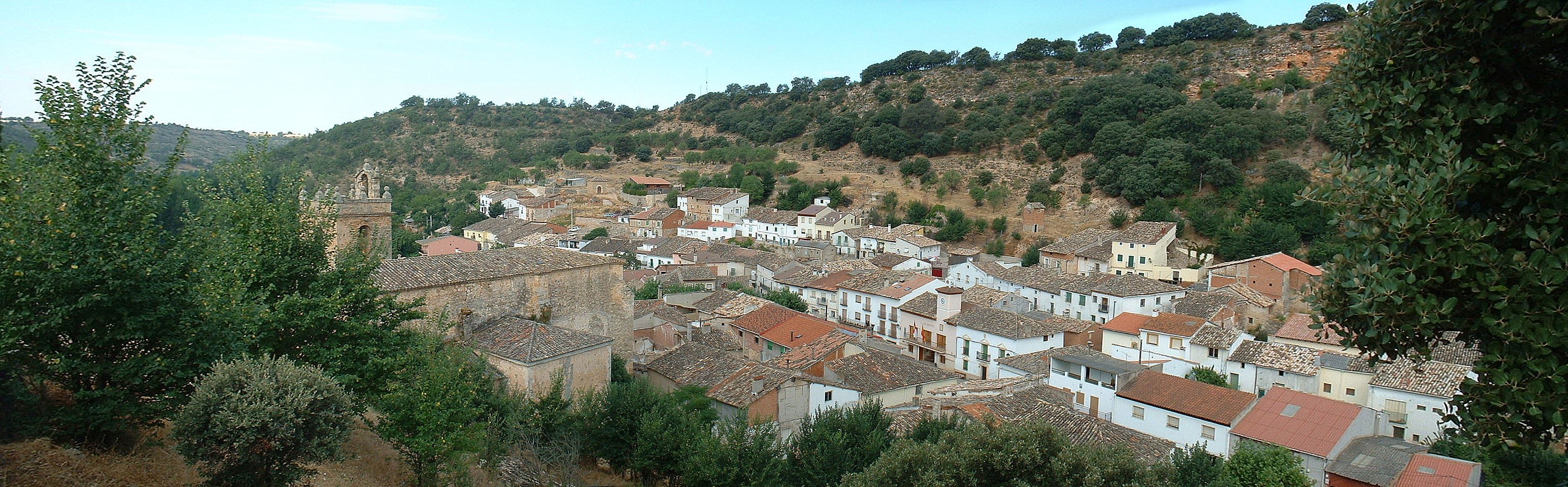 Panorámica de Yélamos de Arriba desde el cementerio municipal